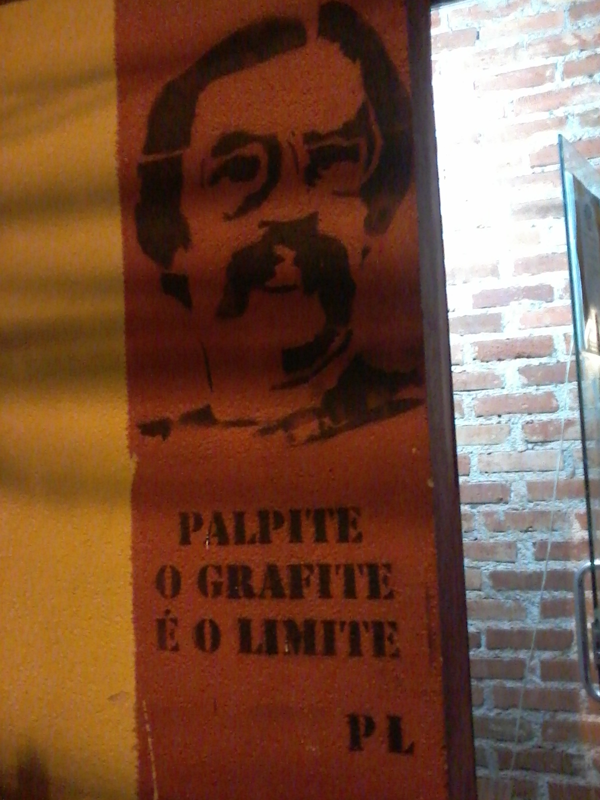 Paulo Leminski grafitado na parede do bar O Torto, em Curitiba